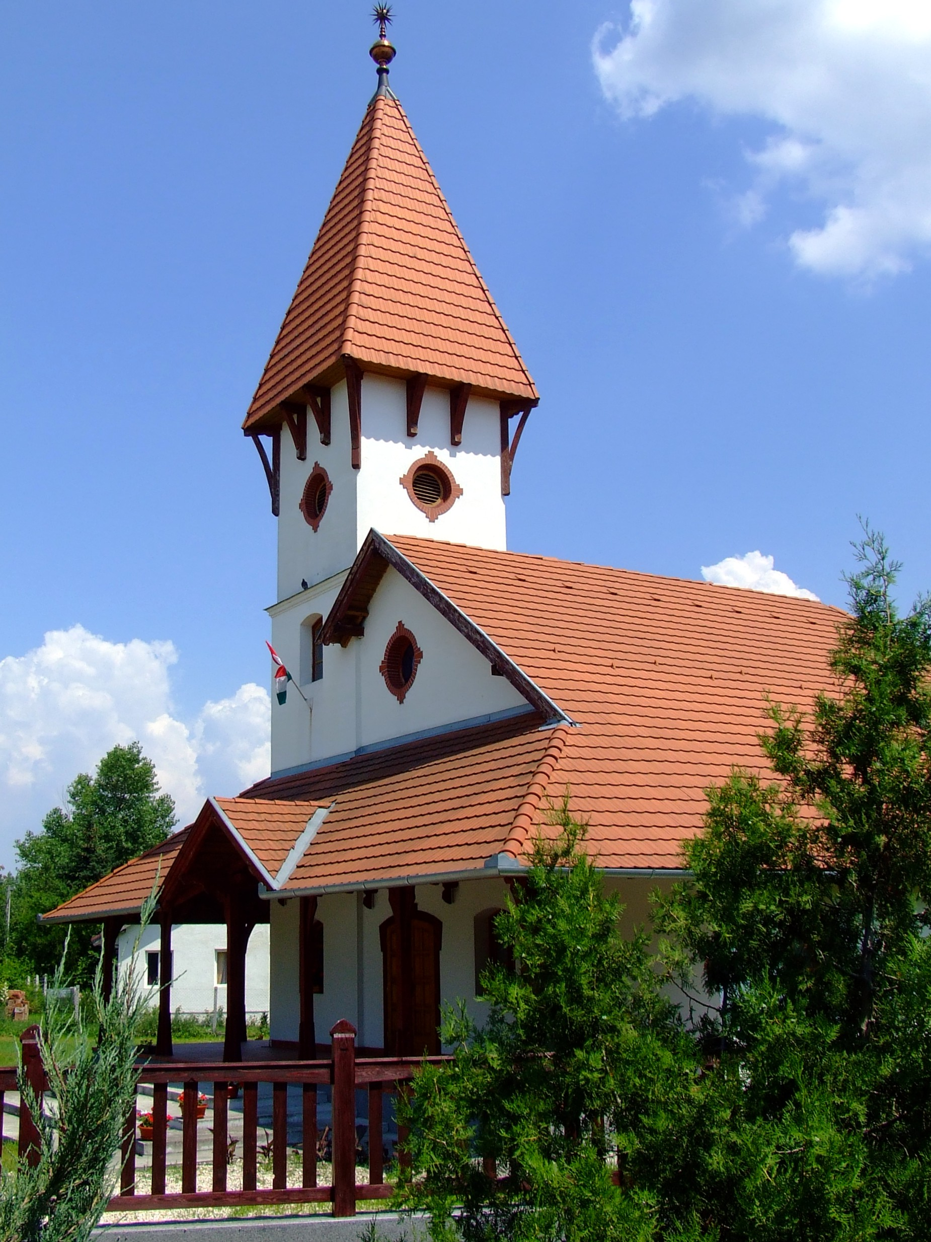 Az apaji református templom